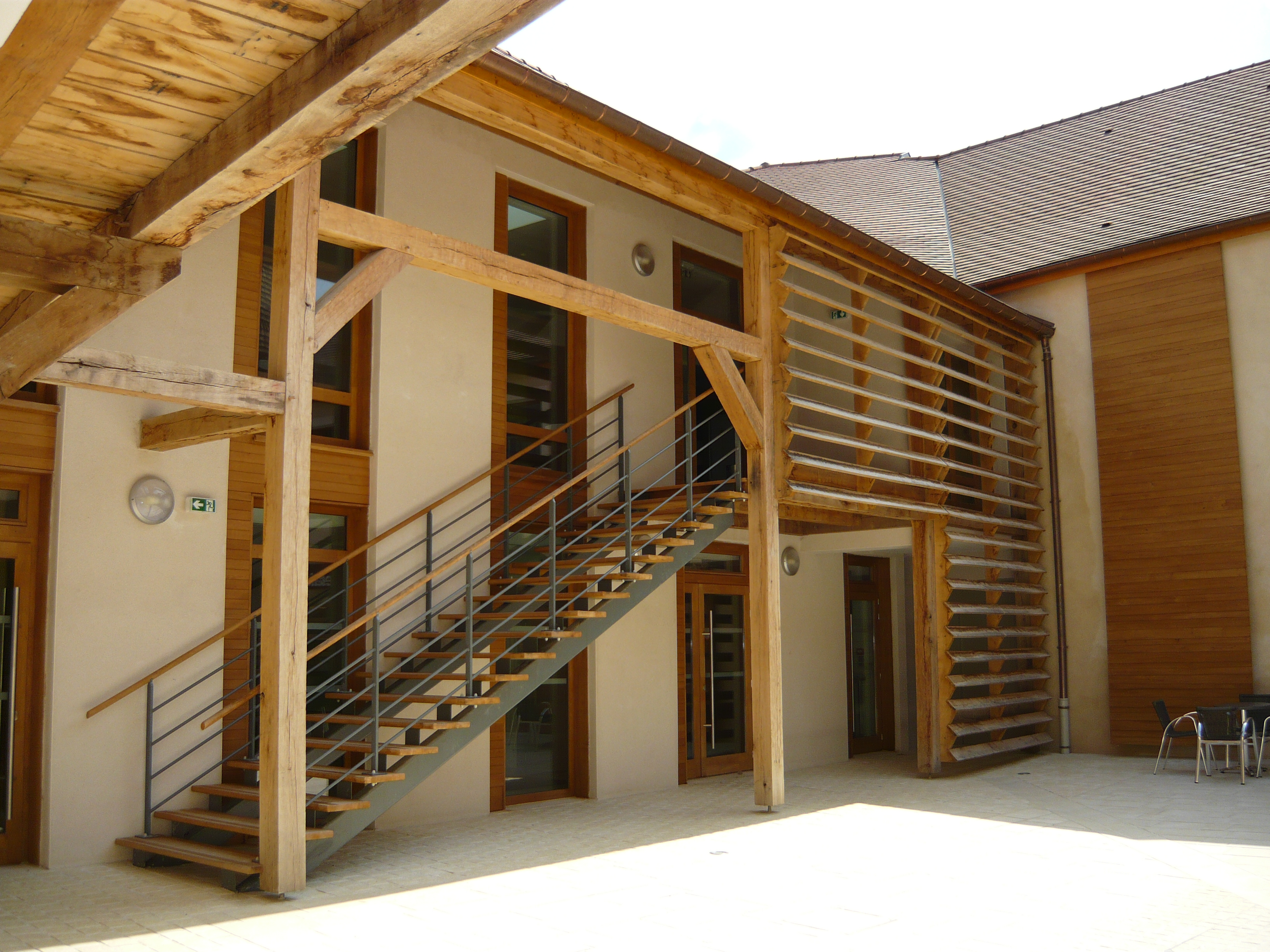 Vue de la Médiathèque depuis la cour intérieure du Relais